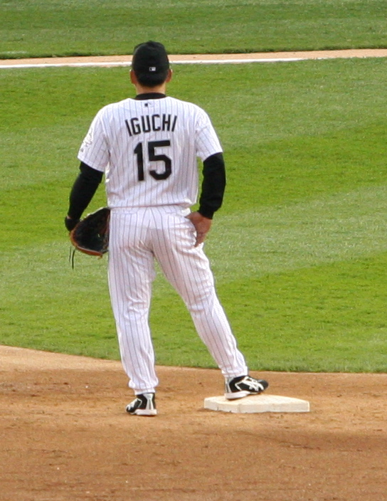 Tadahito Iguchi